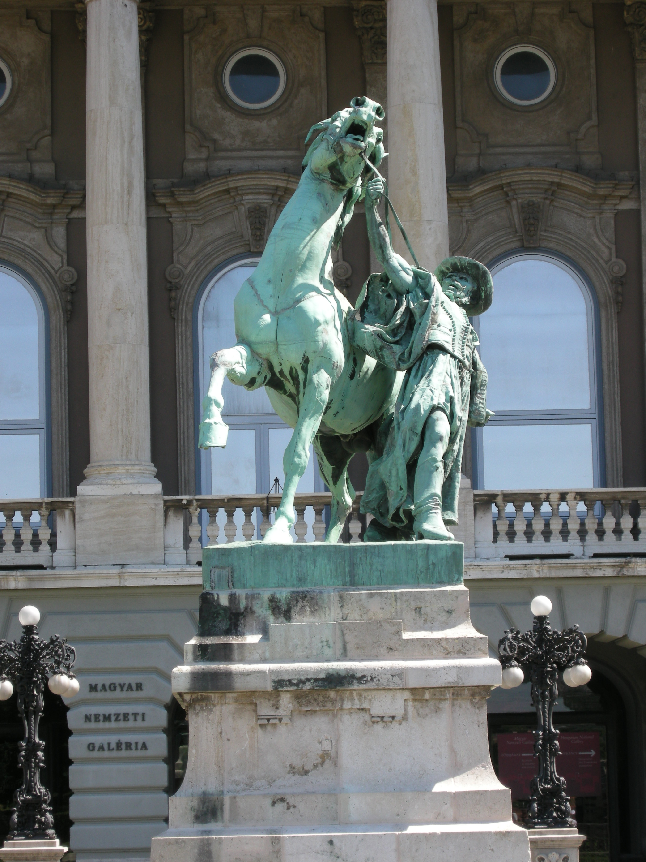 Budapest